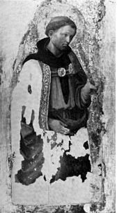 San Lorenzo in trono fra i santi Cosma e Damiano e donatori; San Benedetto (?) e Sant'Antonio Abate (?) (Pala Alessandri) New York, Metropolitan Museum of Art (dal 1935) Tempera su tavola: centrale cm 120,9x105,9, laterali cm 72,4x38,1